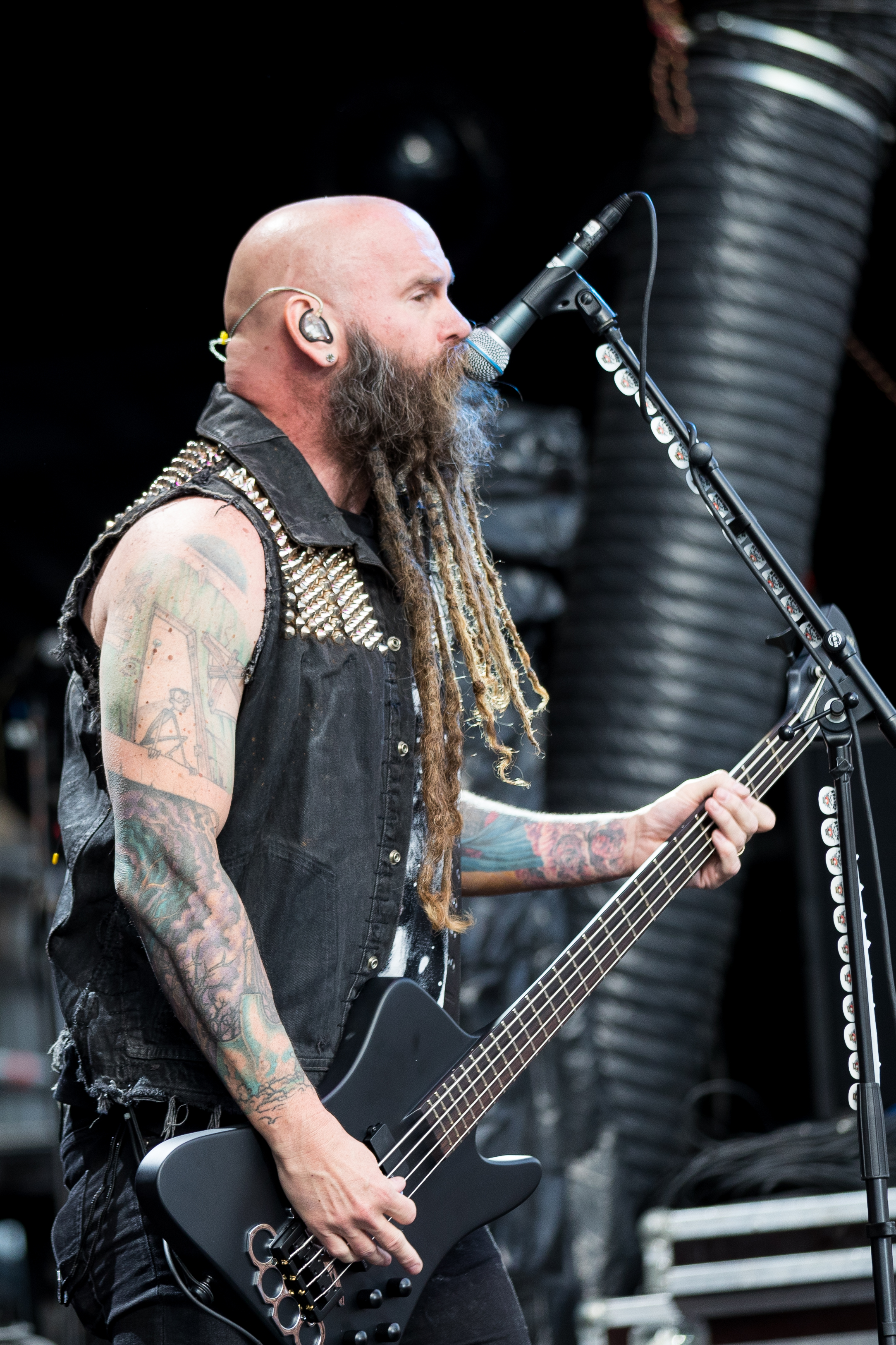 Five Finger Death Punch during Rock am Ring at Nürburgring, Nürnburg, Rheinland Pfalz, Germany on 2017-06-02, Photo: Sven Mandel